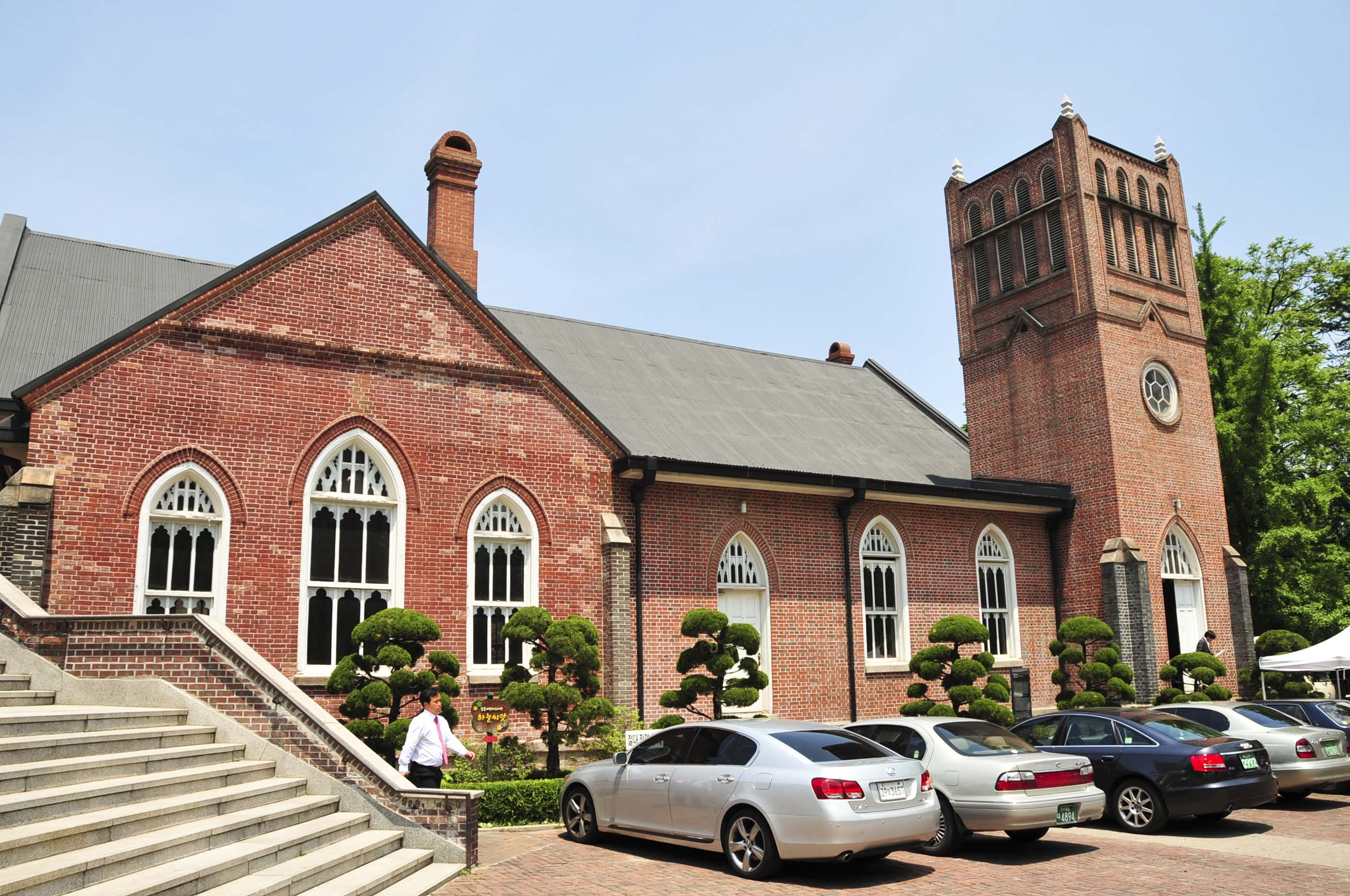 사적 제256호 정동교회(貞洞敎會), 서울특별시 중구 정동 32-2 (지정일 1977.11.22)